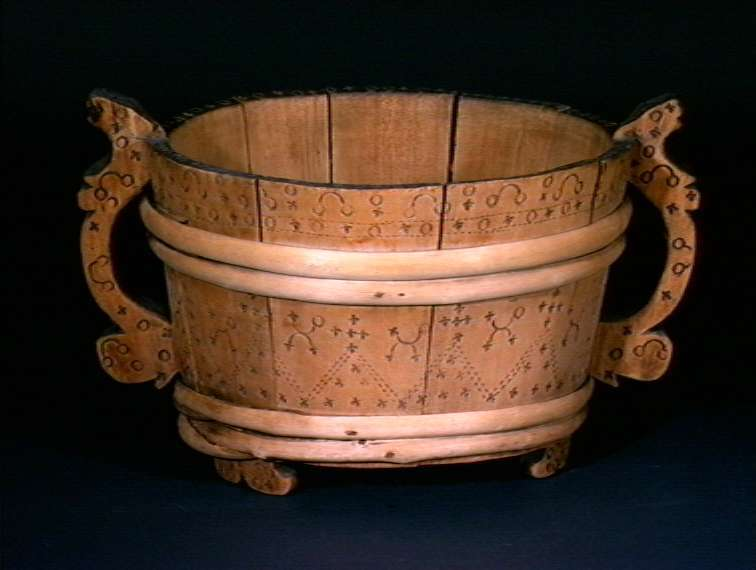 Lagget ostestaup av gran med svidekor, antakelig fra ca 1800, fra Bykle i Aust-Agder. Foto Anne-Lise Reinsfelt / Norsk Folkemuseum, NF.1897-0860.